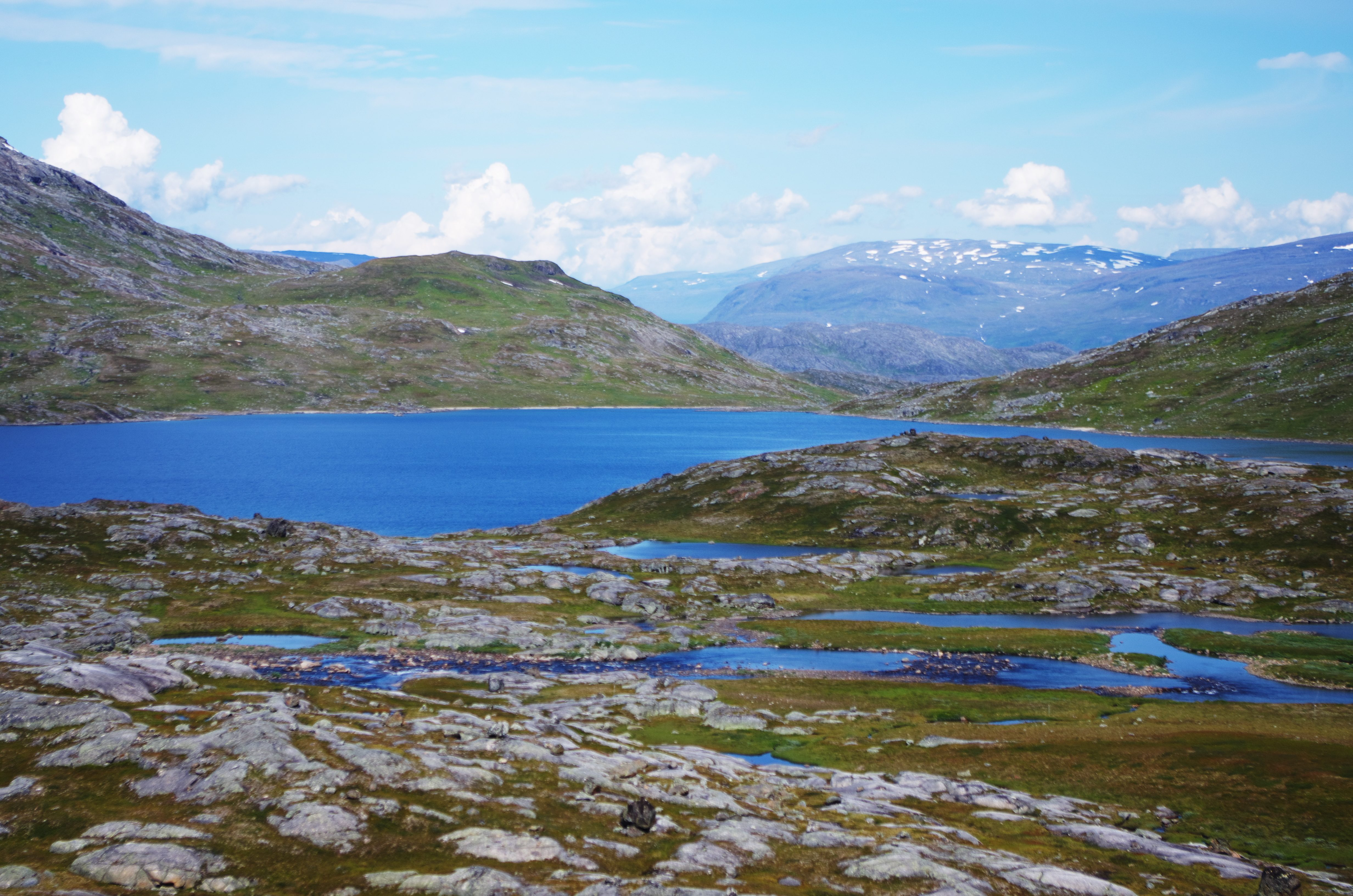 Katterjaure (Nordsamiska:Gátterjávri) är en sjö i Kiruna kommun i Sverige. Sjön ligger en knapp mil söder om Riksgränsen och klyvs av på mitten av den Norsk-Svenska gränsen.